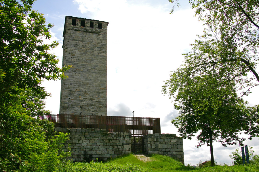 La Torre di Buccione sulla cima dell'omonimo colle sul Lago d'Orta, Orta San Giulio (NO)